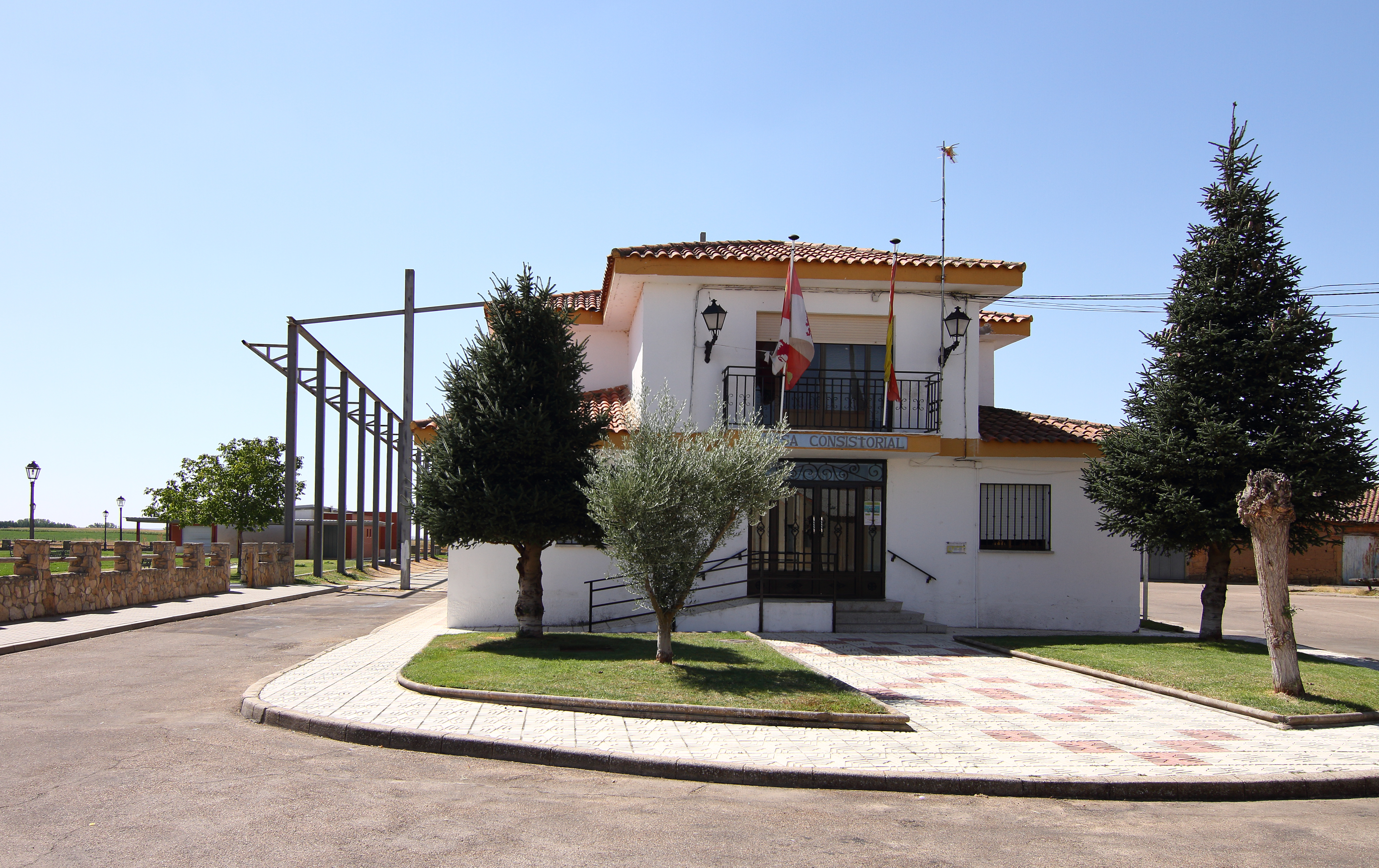 Ayuntamiento de San Morales